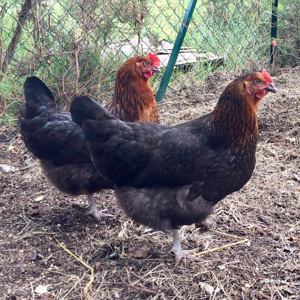 Poule Black Rock ou Harco